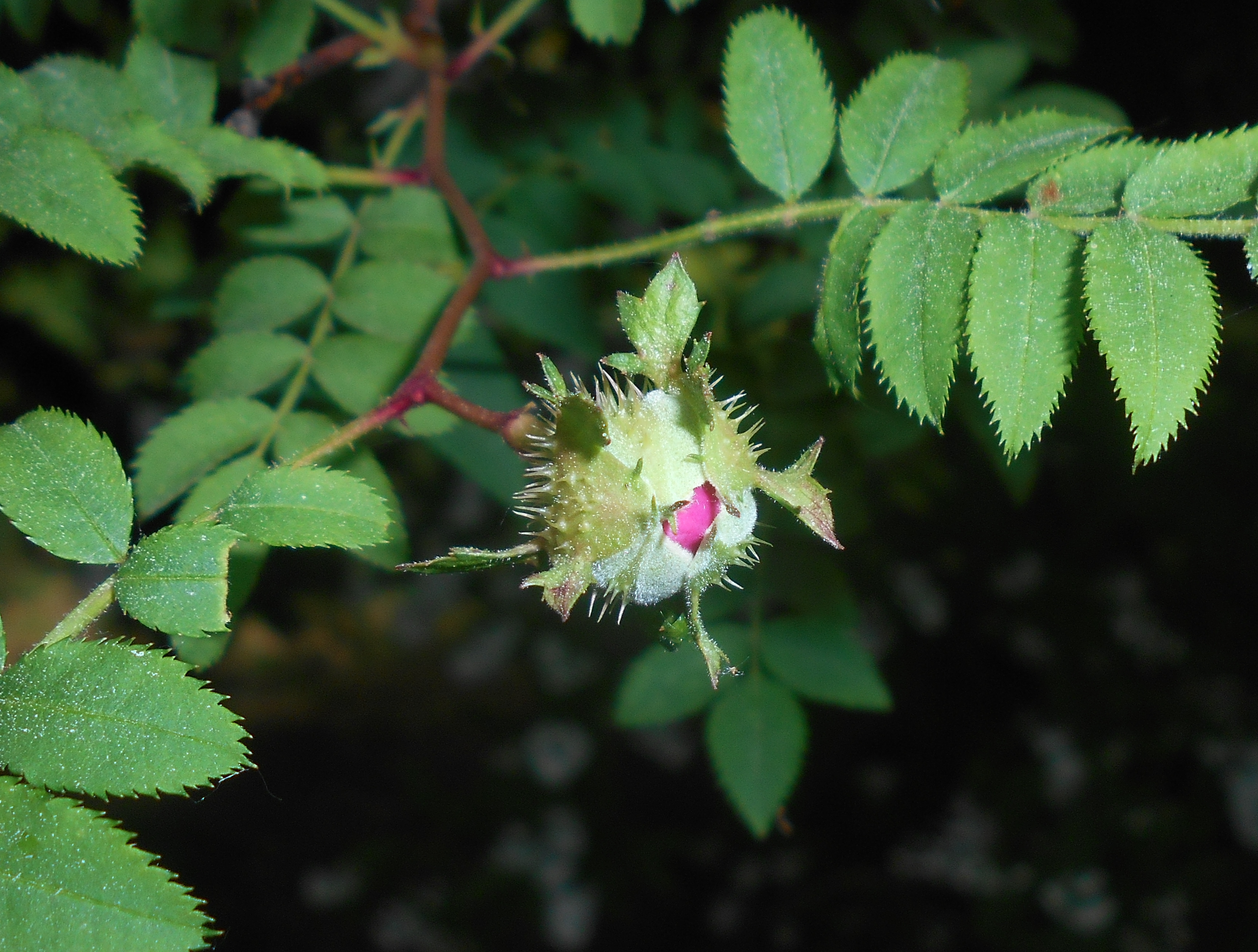 Róża kasztanowa (Rosa roxburghii), Ogród Botaniczny UMCS w Lublinie.